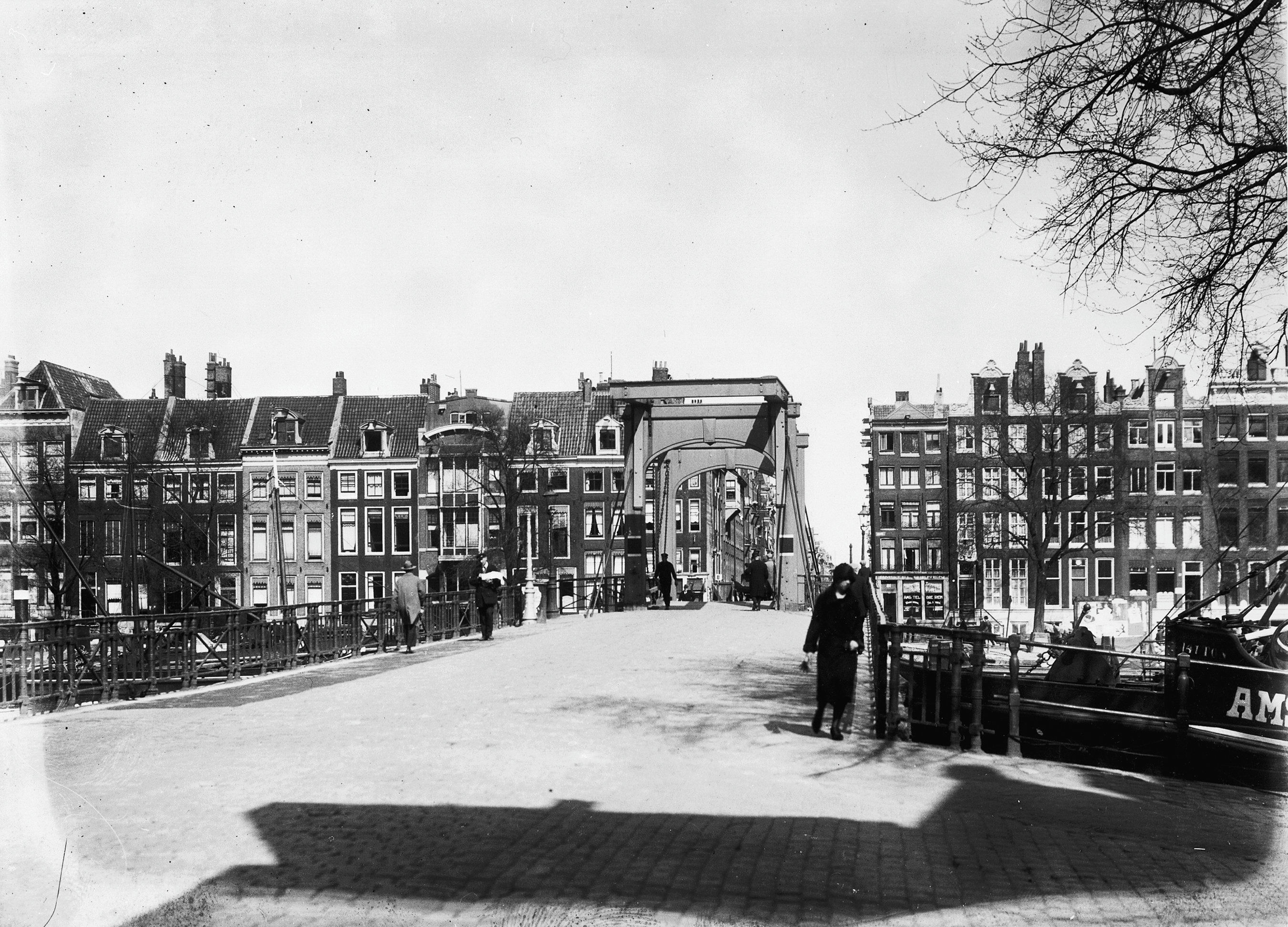 Magere Brug: overzicht onevenzijde ter hoogte van de Magere brug This is an image of rijksmonument number 167 This is an image of rijksmonument number 168 This is an image of rijksmonument number 169 This is an image of rijksmonument number 170 This is an image of rijksmonument number 171 This is an image of rijksmonument number 172 This is an image of rijksmonument number 173 This is an image of rijksmonument number 174